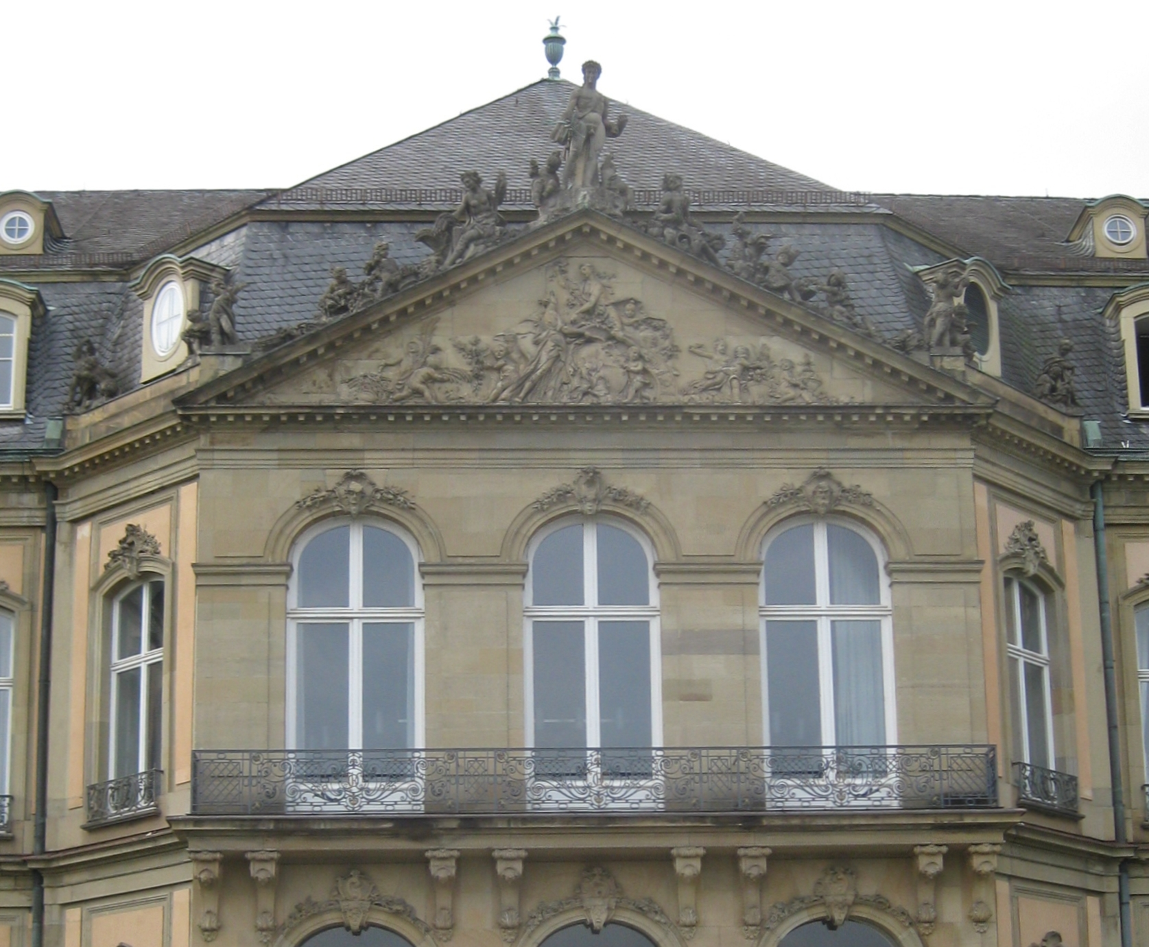 Gartengiebel des Neuen Schlosses in Stuttgart mit Bildhauerarbeiten von Domenico Ferretti, Fassade des Gartenflügels zum Oberen Schlossgarten, Giebel des Mittelbaus.